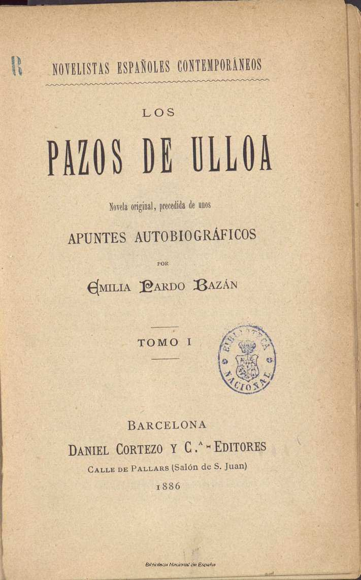 Los pazos de Ulloa : novela original, precedida de unos apuntes autobiográficos por Emilia Pardo Bazán Autora: Pardo Bazán, Emilia, Condesa de (1851-1921) Fecha: 1886 Datos de edición: Barcelona, Daniel Cortezo y Cª